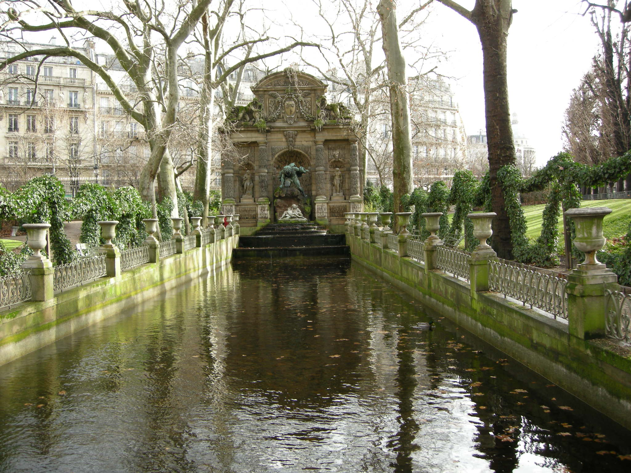 Fontana di maria de' medici